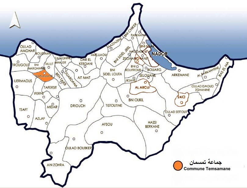 جماعة تمسمان Commune Temsamane